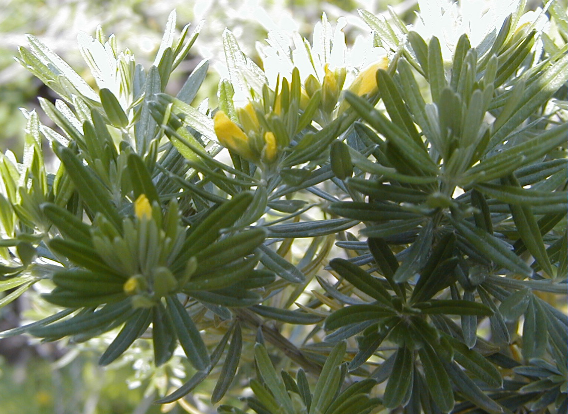 Genista linifolia (syn. Teline linifolia). Real Jardín Botánico, Madrid.